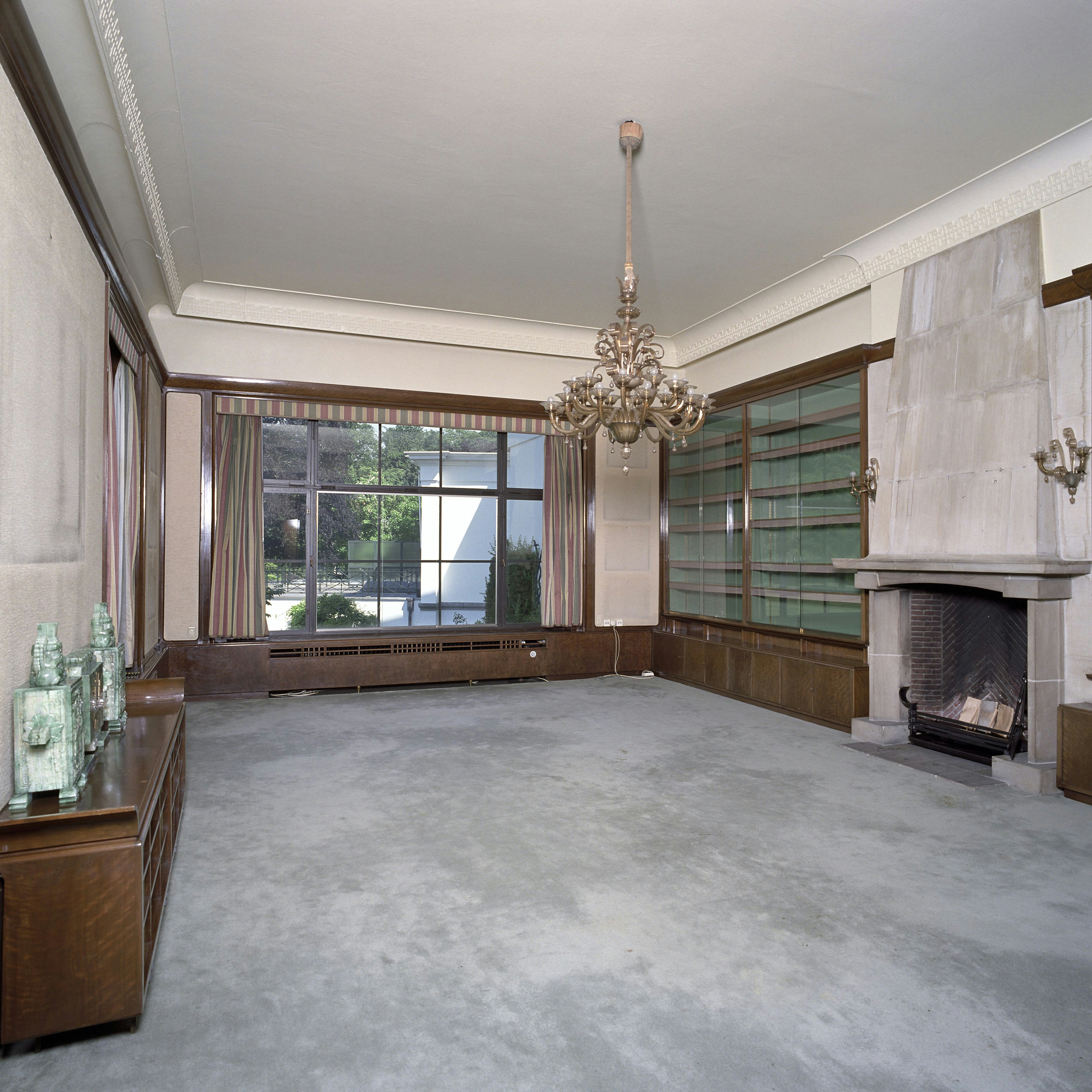 Paleis Soestdijk: Interieur, overzicht van de lege bibliotheek annex woonkamer met schouw en kroonluchter, gelegen aan de achterzijde van het middengedeelte tussen het corps de logis en de Baarnse vleugel (opmerking: FOTO ALLEEN OP AANVRAAG EN ONDER VOORWAARDEN BESCHIKBAAR)